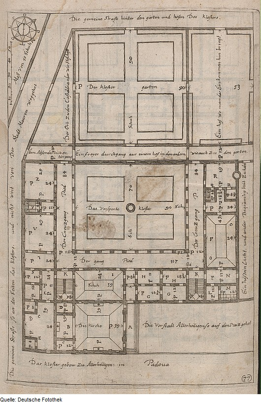 Original image description from the Deutsche Fotothek Architektur & Sakralbau & Kloster & Kirche & Klostergarten